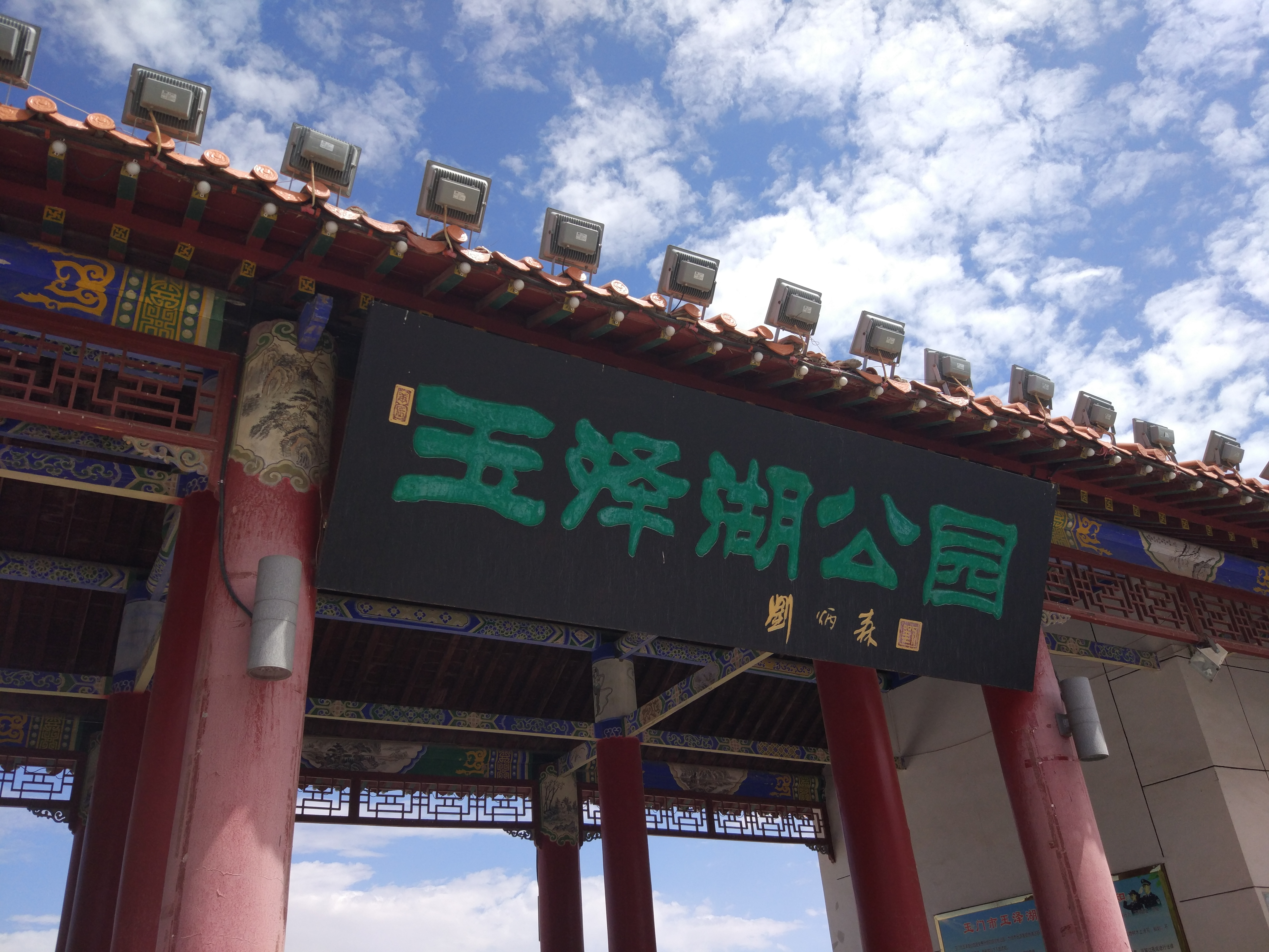 玉门市玉泽湖公园南门匾额，摄于2017年8月